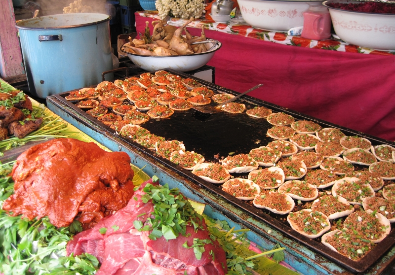 taco-stand